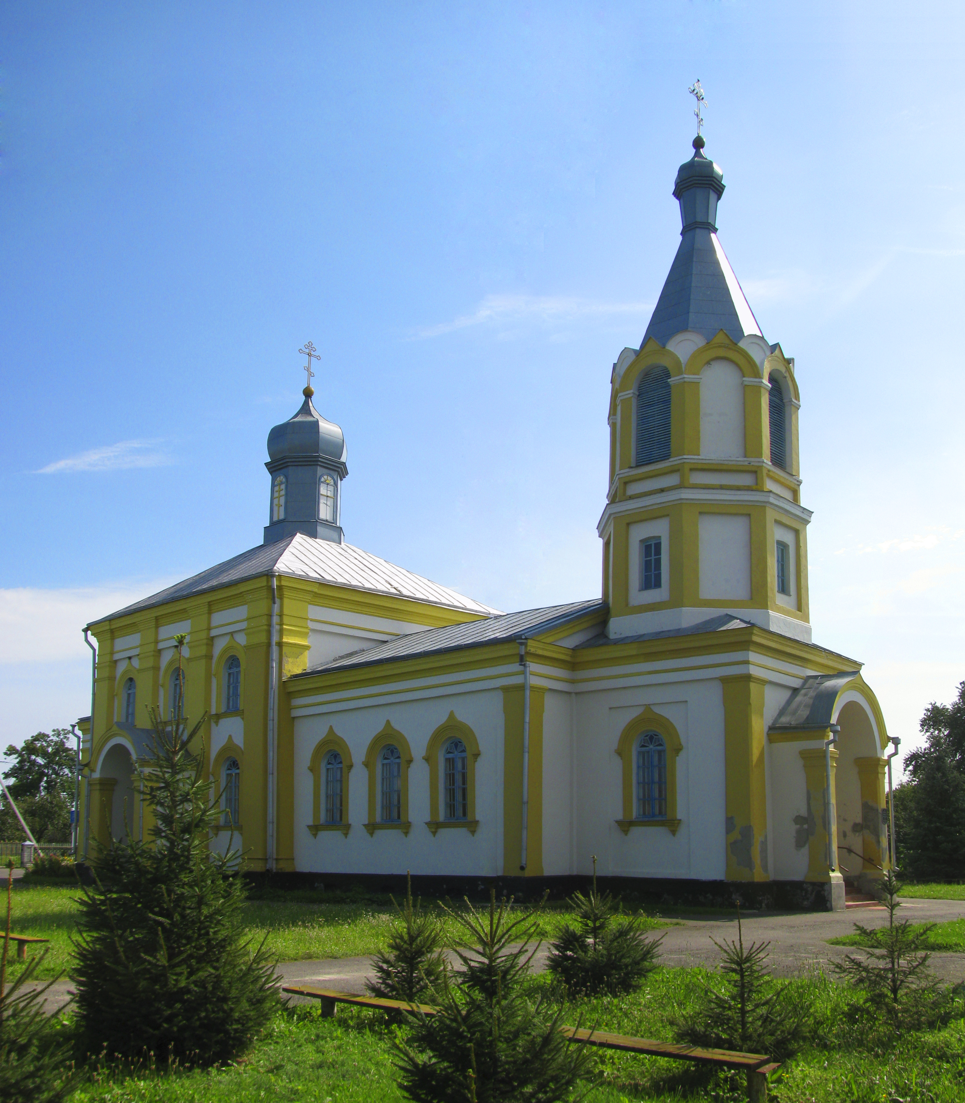 Беларуская (тарашкевіца): Мікалаеўская царква, г. п. Шарашоў This is a photo of Belarusian heritage monument. Reference number: 112Г000656 ( WLM)